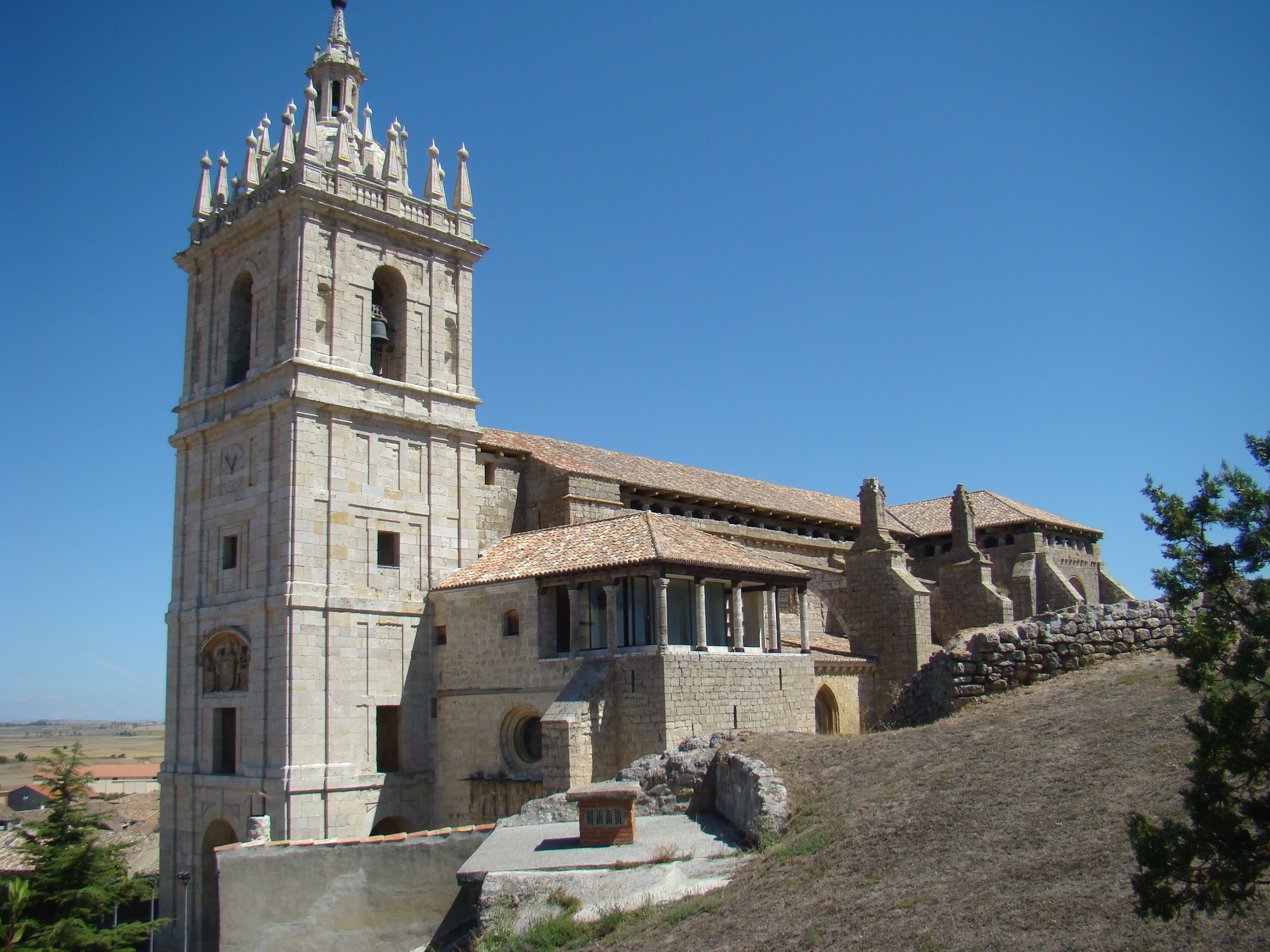 Iglesia de San Hipólito en Támara de Campos (Palencia, España). Vista de la llamada casa del músico sobre el lateral este de la iglesia junto a la torre.